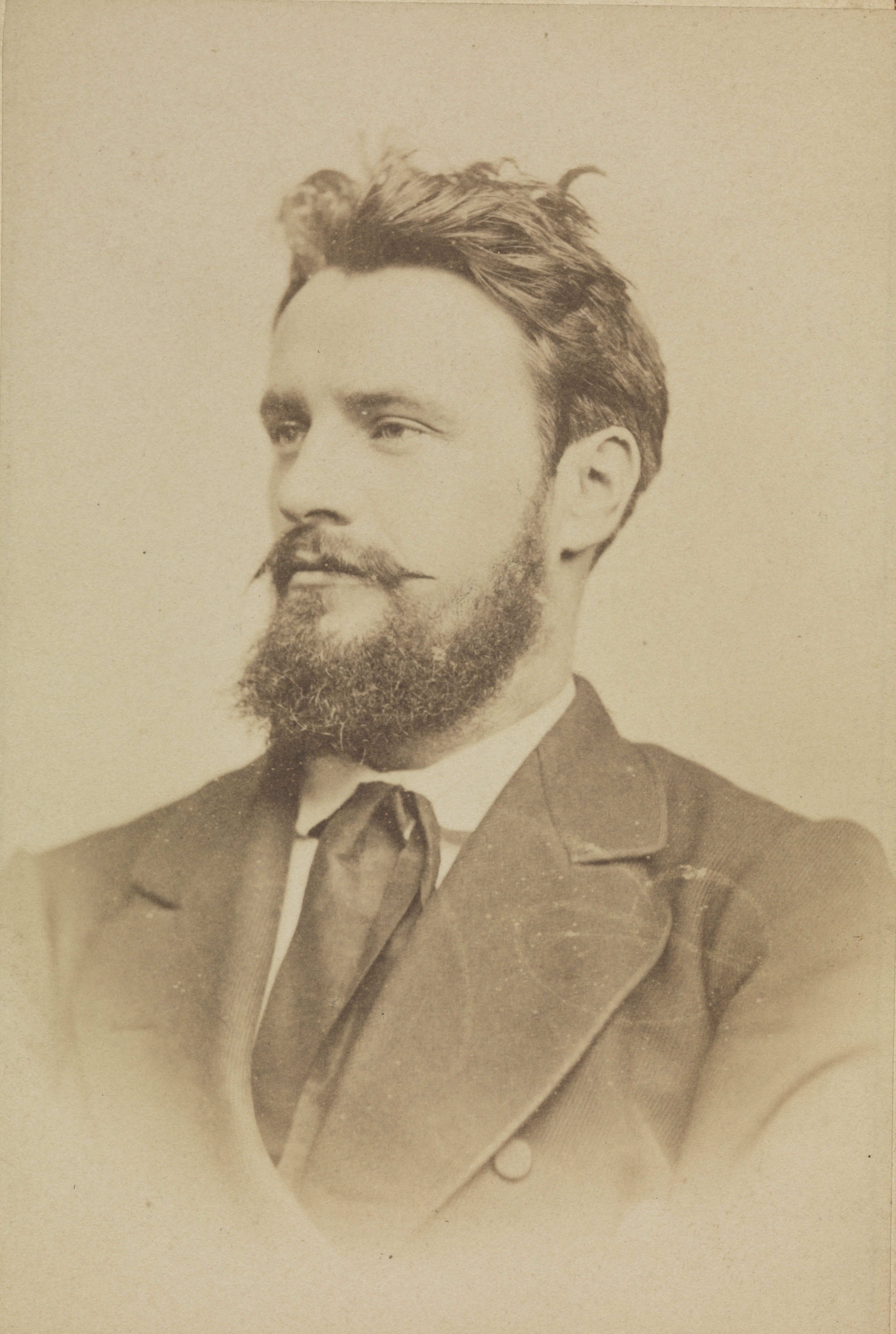 Edv. Diriks. Med dedikasjon. Depicted person: Diriks, Edv. Depicted place: Tyskland, Weimar